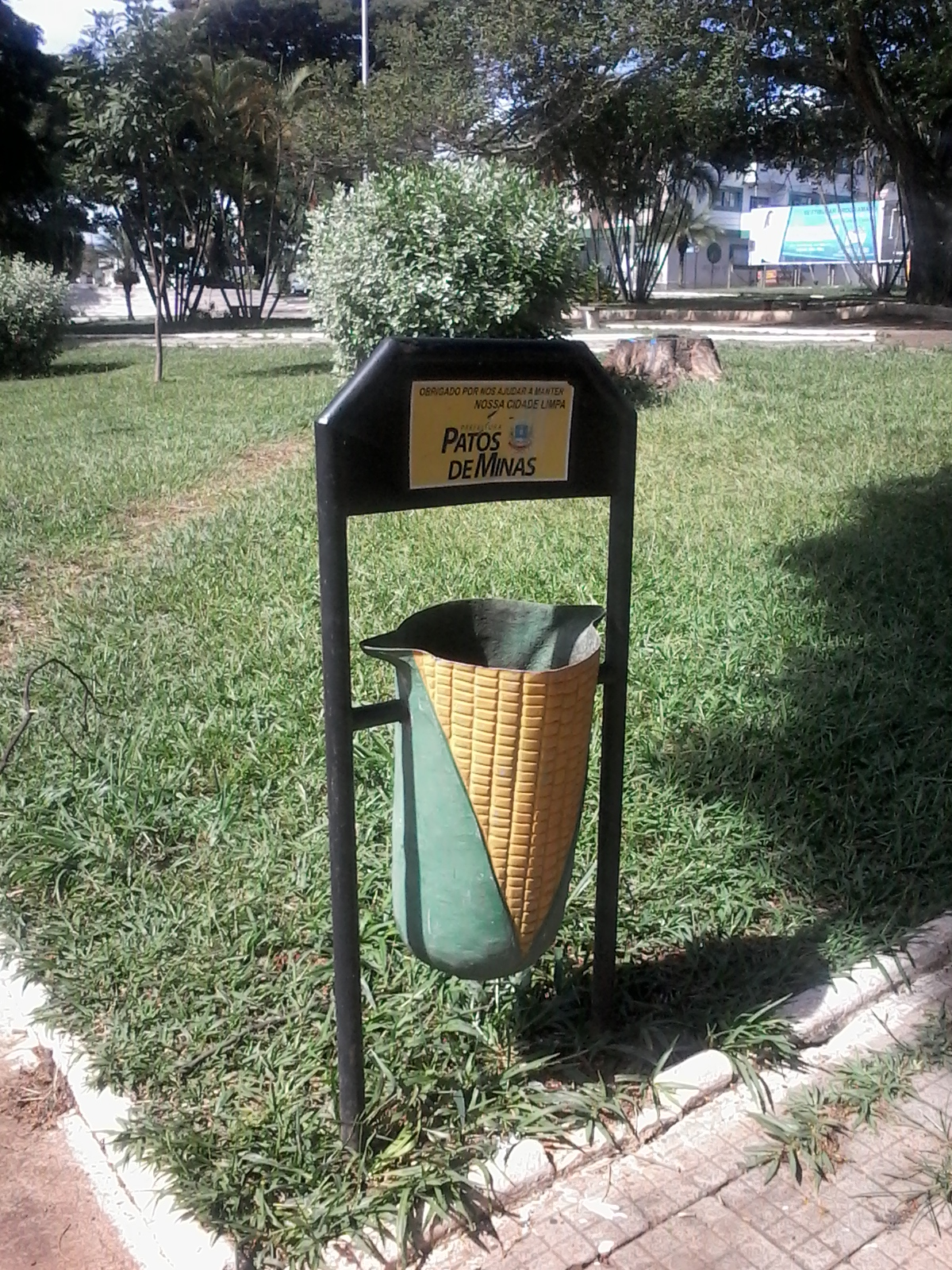 Lixeira em formato de espiga de milho, no Centro de Patos de Minas.